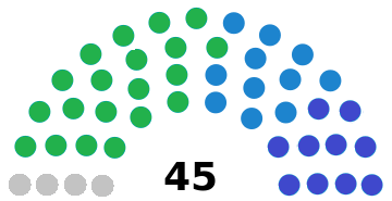 composicion del Congreso costarricense de 1958